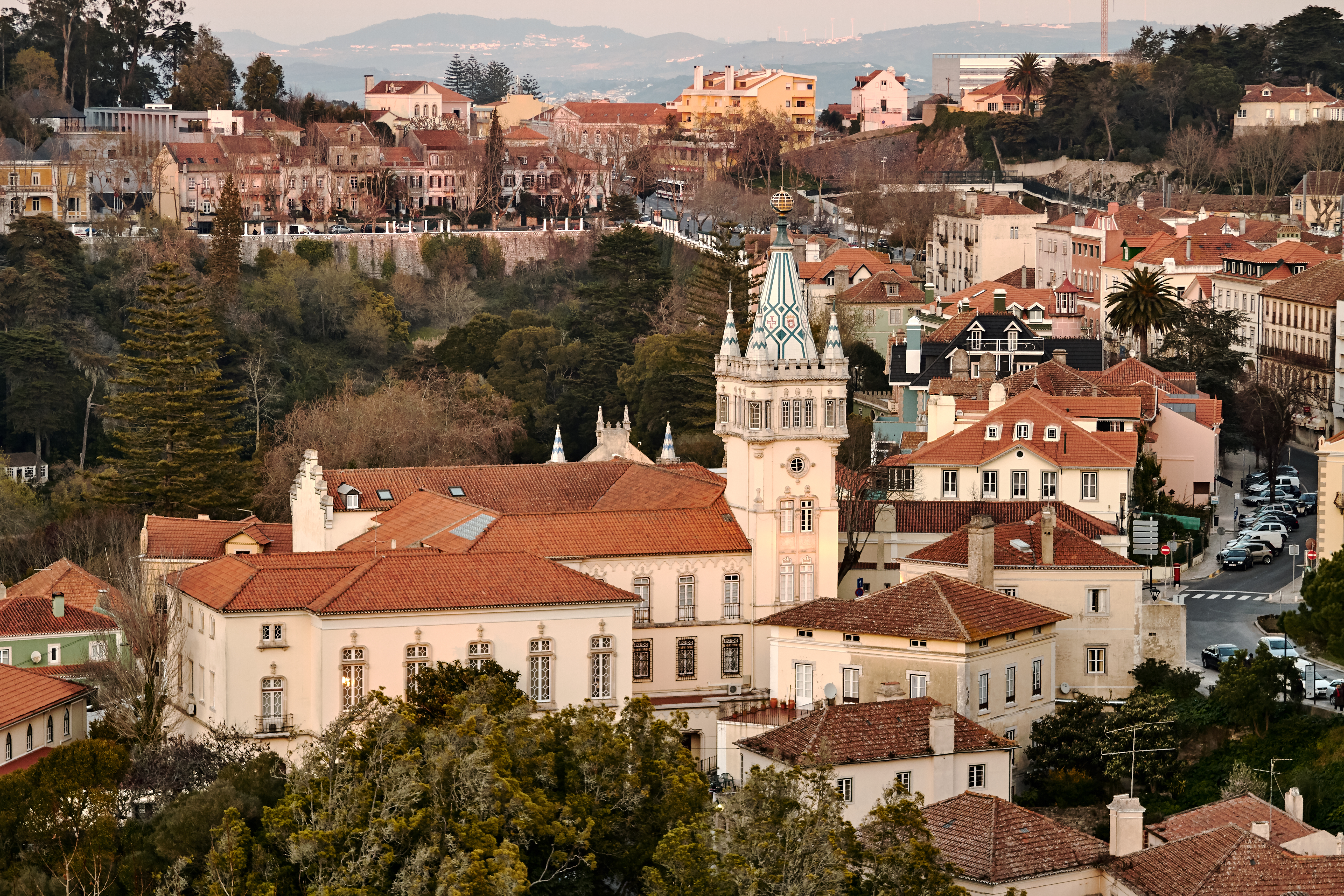 Sintra, Portugal